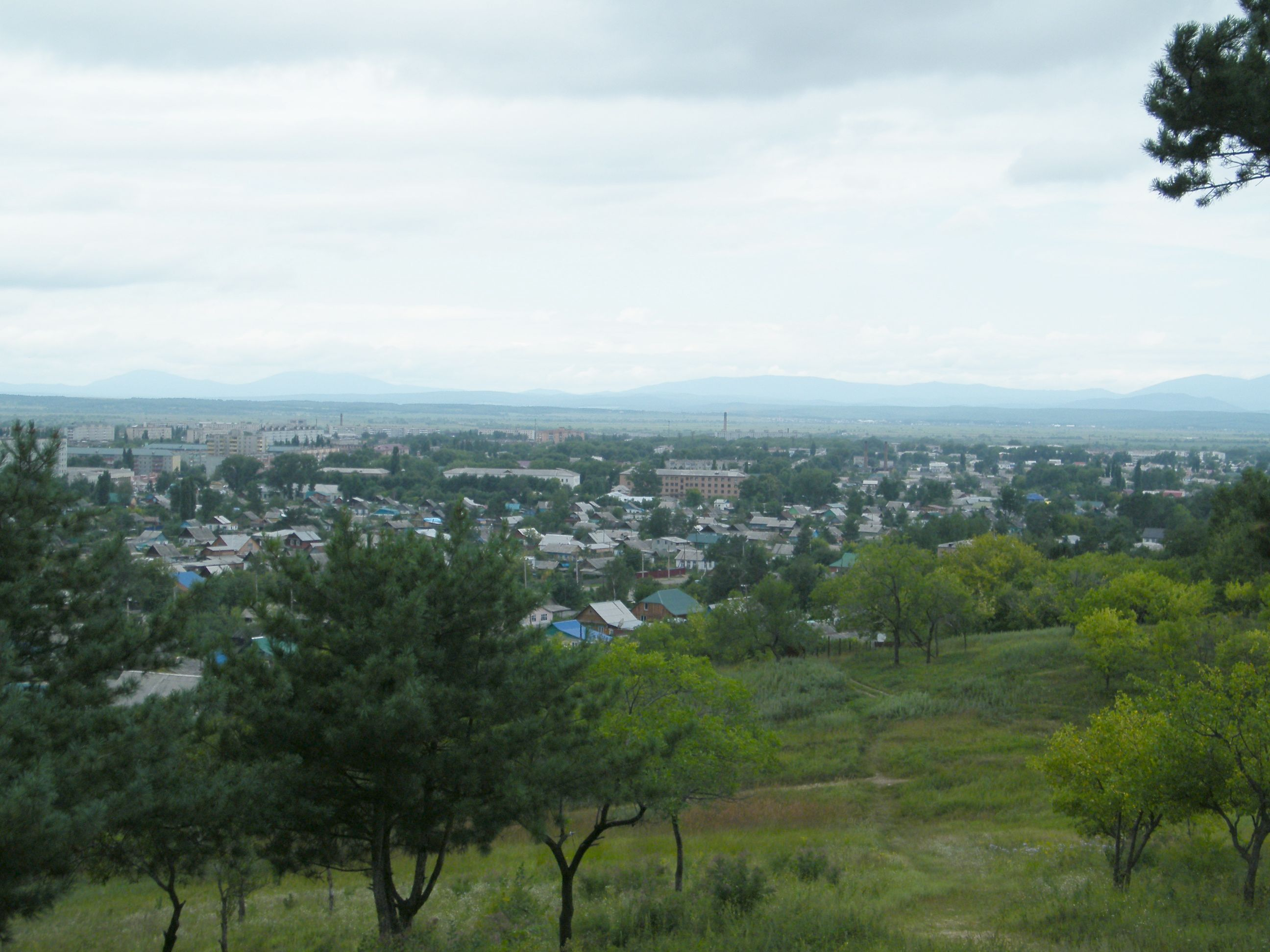 Город Арсеньев с сопки